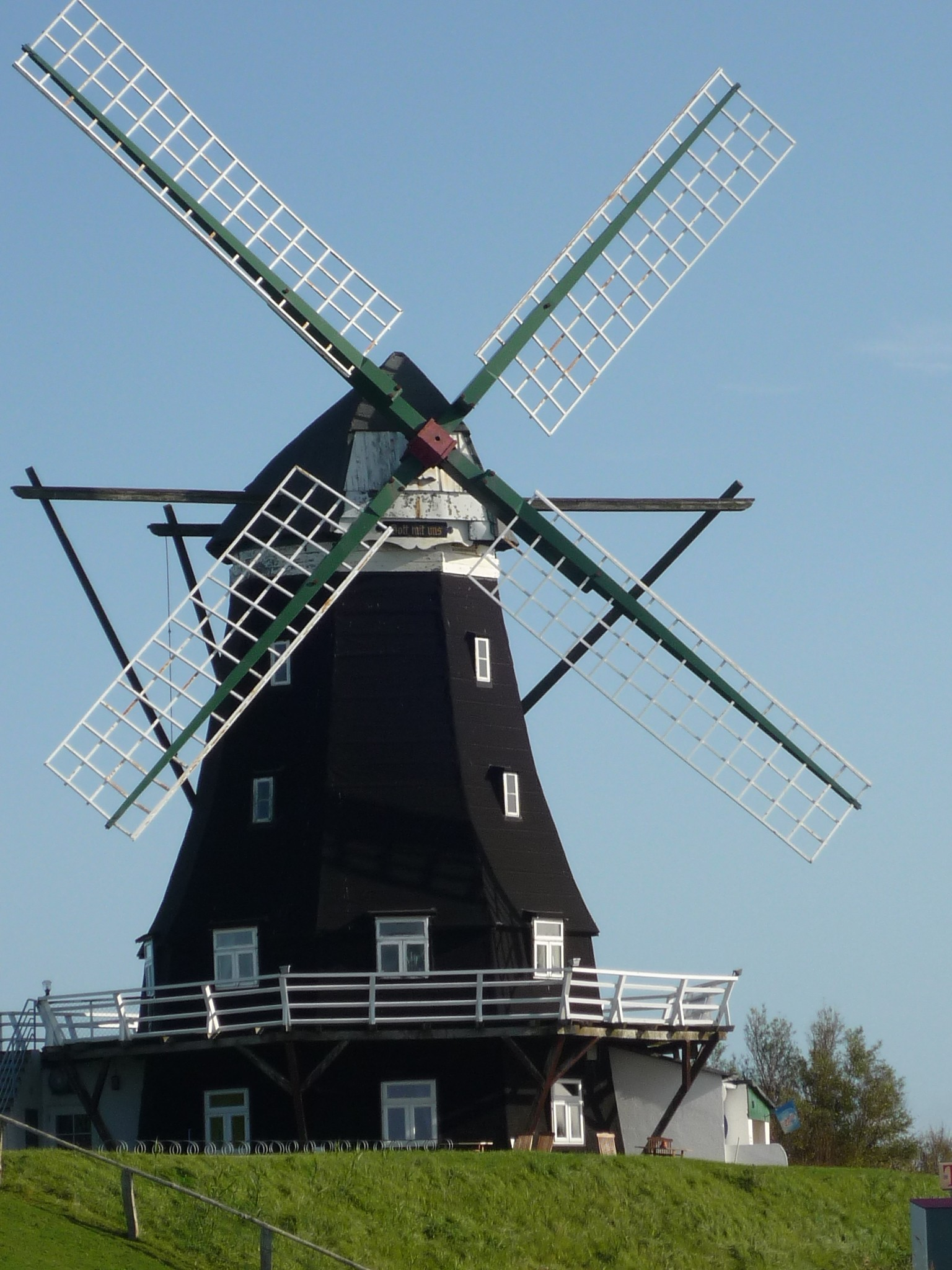 Die Nordermühle auf der Nordseeinsel Pellworm (Kreis Nordfriesland, Bundesland Schleswig-Holstein)